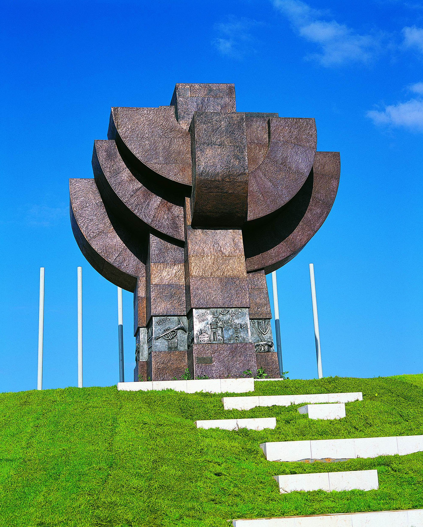 פסל התקומה, עשוי מעטה נחושת מרוקעת ע"ג קונסטרוקציית פלדה, בשילוב 14 תבליטים יצוקי אלומיניום הסוקרים את תקומת ישראל עד 1948. גובה הפסל 9 מ designed by Eliezer Weishoff